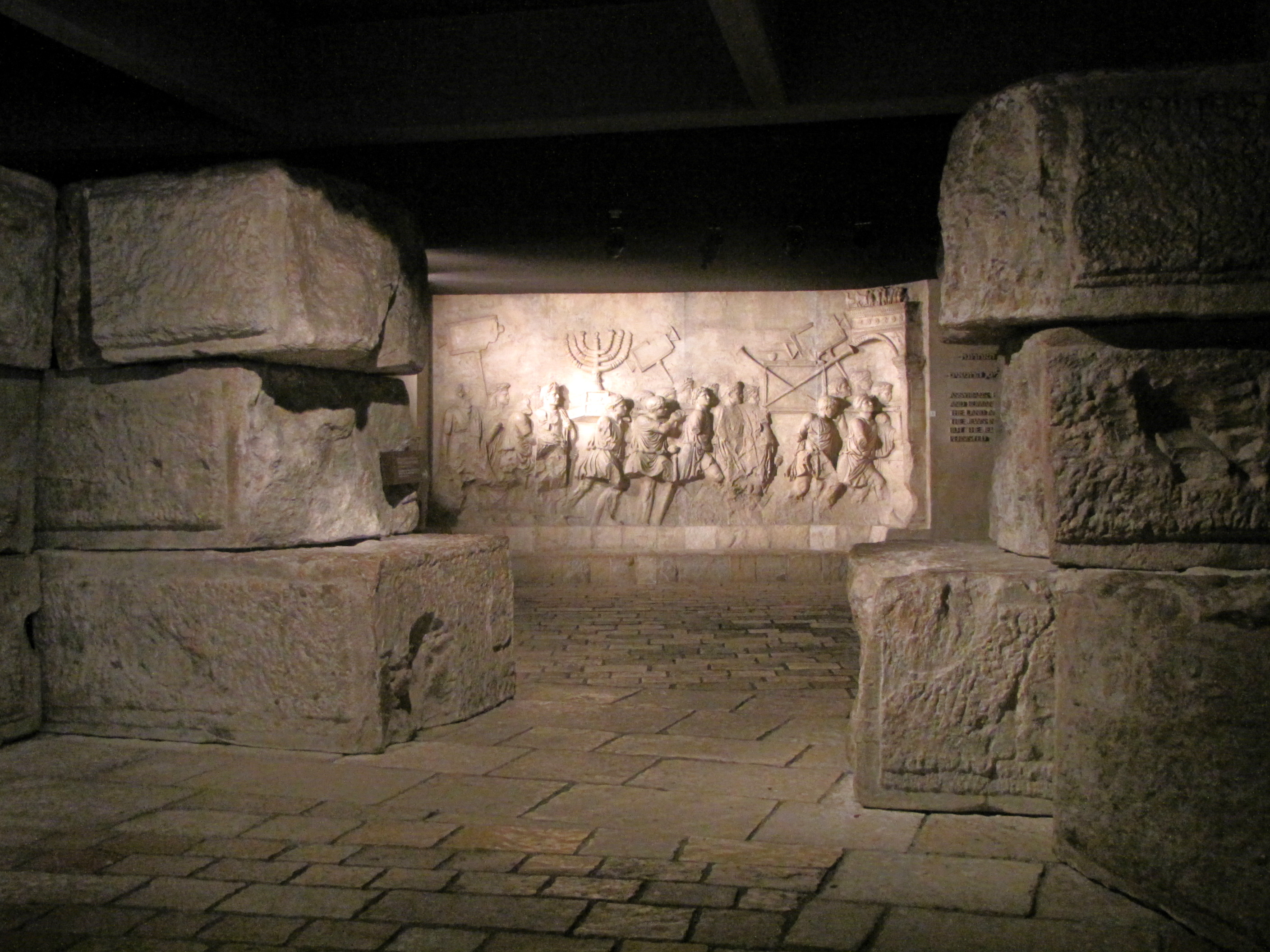 Beyt ha-Tefutsoth